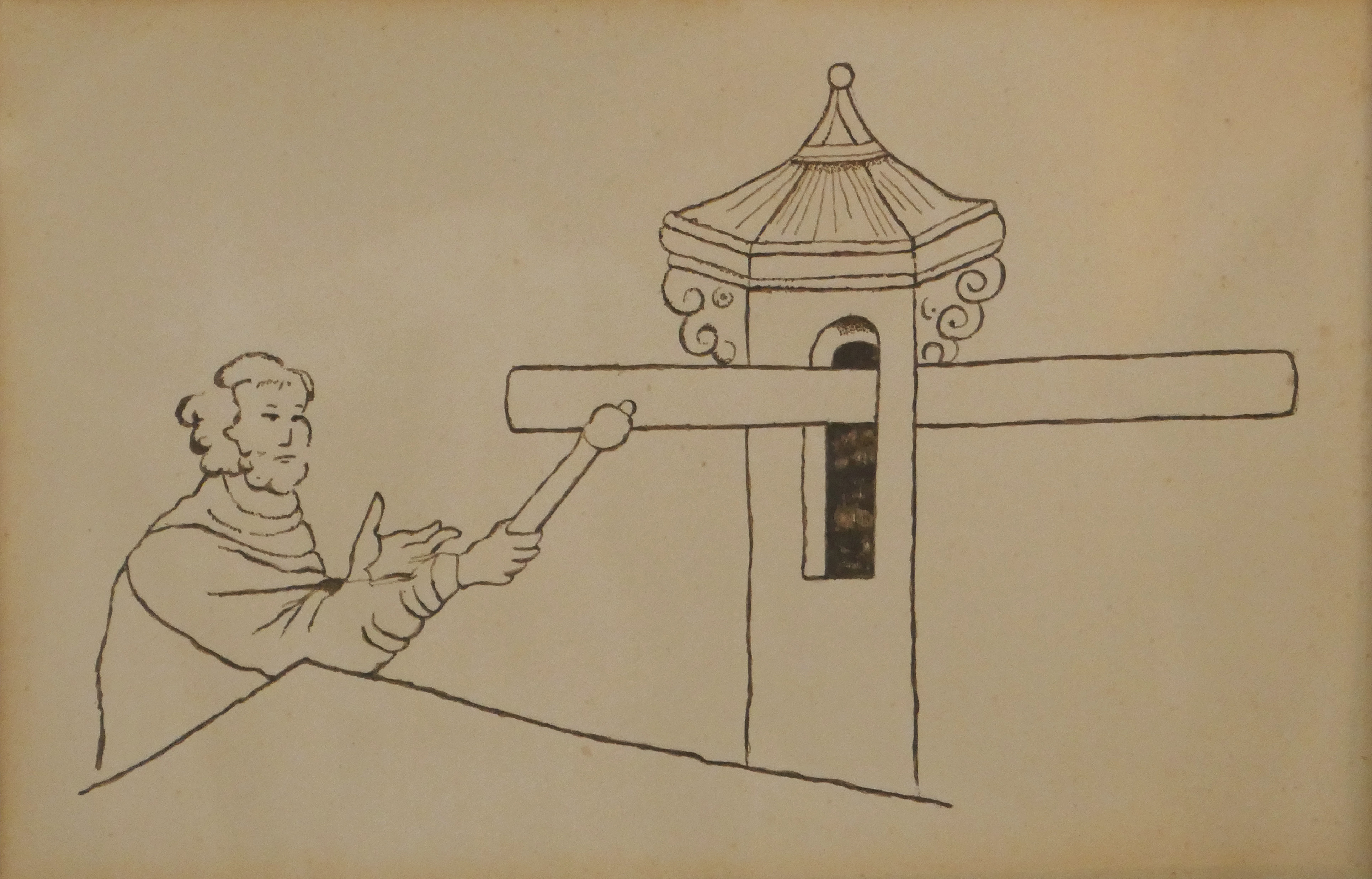 Extrait d'un document du XVIe siècle (copie) montrant une activité de Nicolai Tchudotvorets, "tapant la planche" (simandre). Musée des Cloches (Valday, Russie).